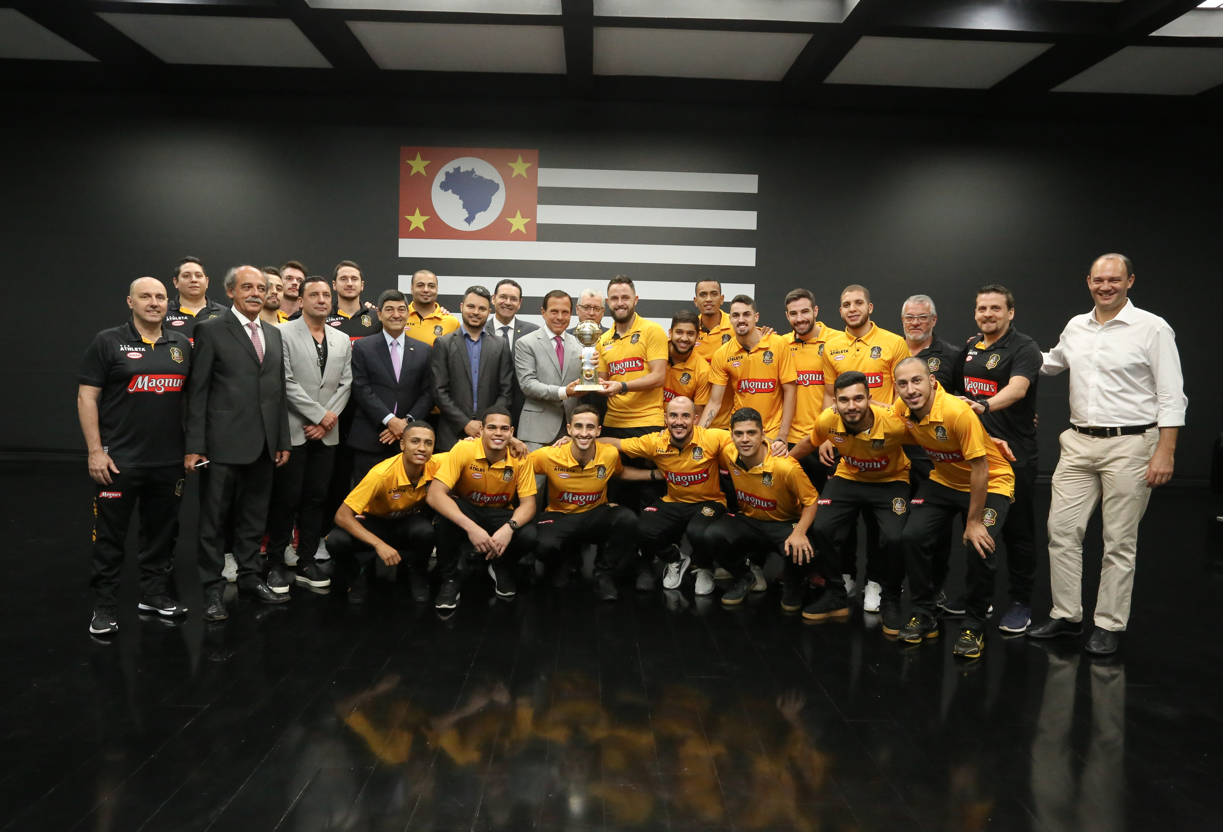 O Governador do Estado de São Paulo, João Doria, com o time Tricampeão Mundial de Futsal de Sorocaba. Local: São Paulo-SP. Data: 04/102019 Foto: Governo do Estado de São Paulo